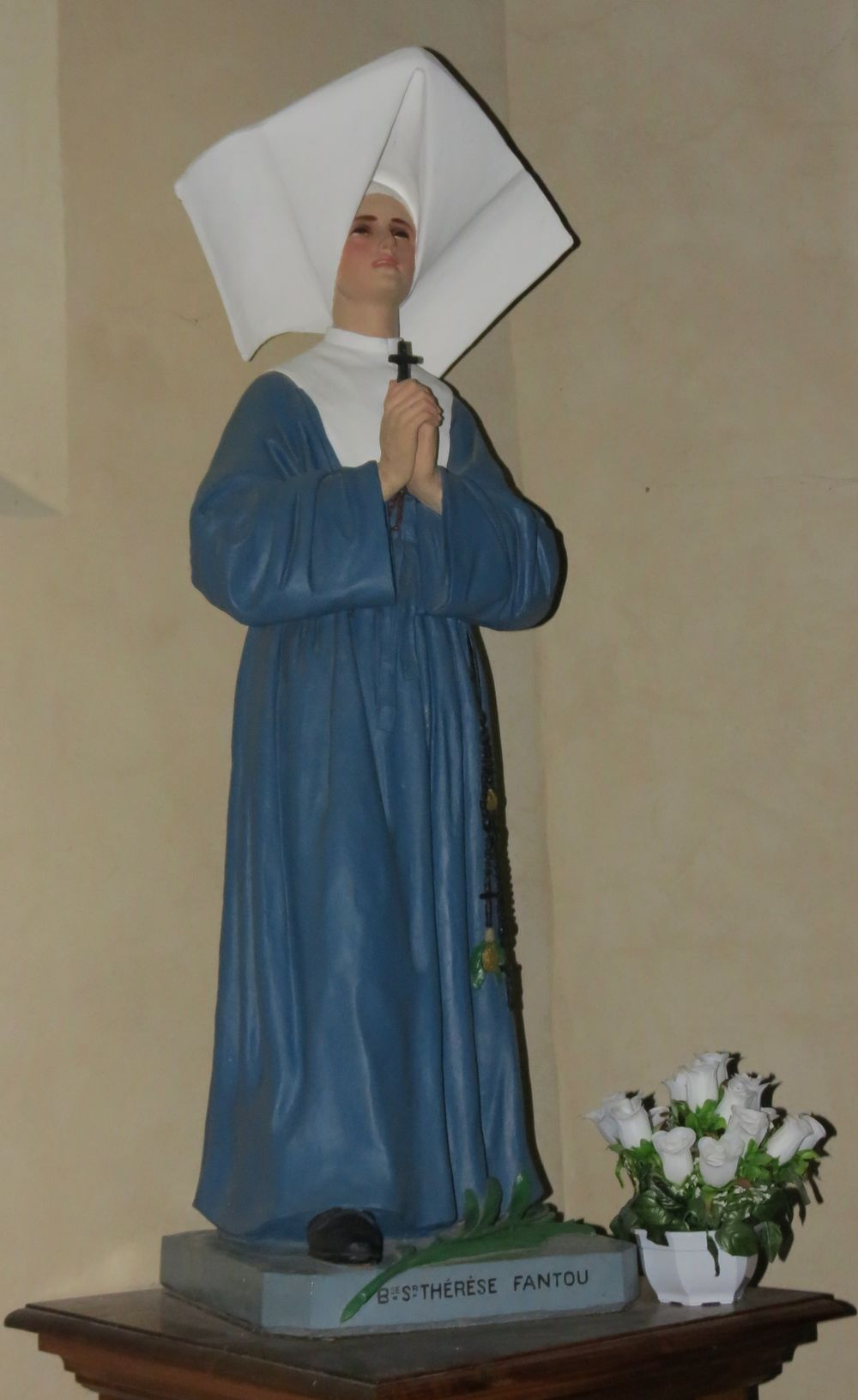 Statue de la Bienheureuse Thérèse Fantou dans l'église de Miniac-Morvan (35)